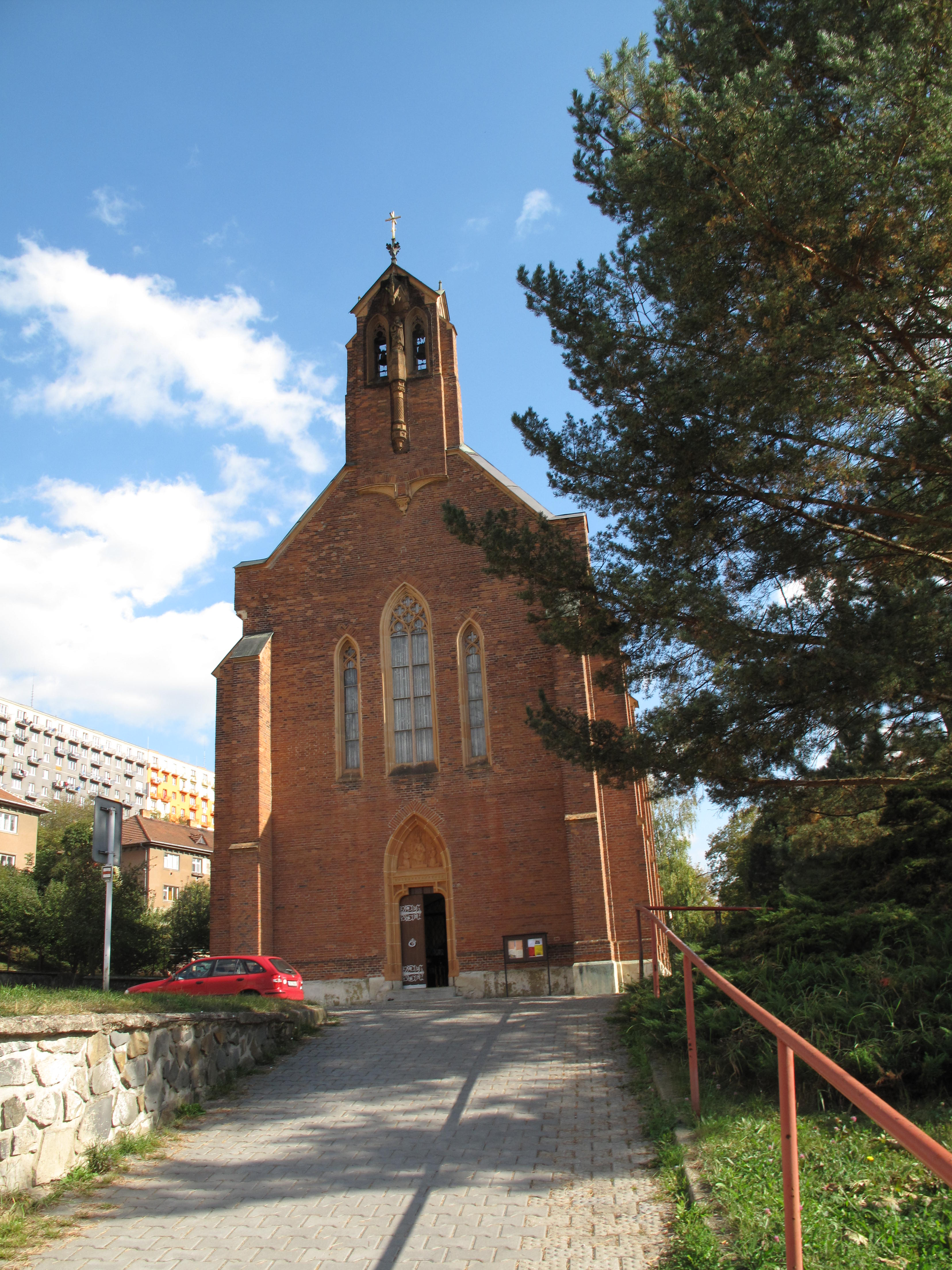 Adamov, kostel sv. Barbory